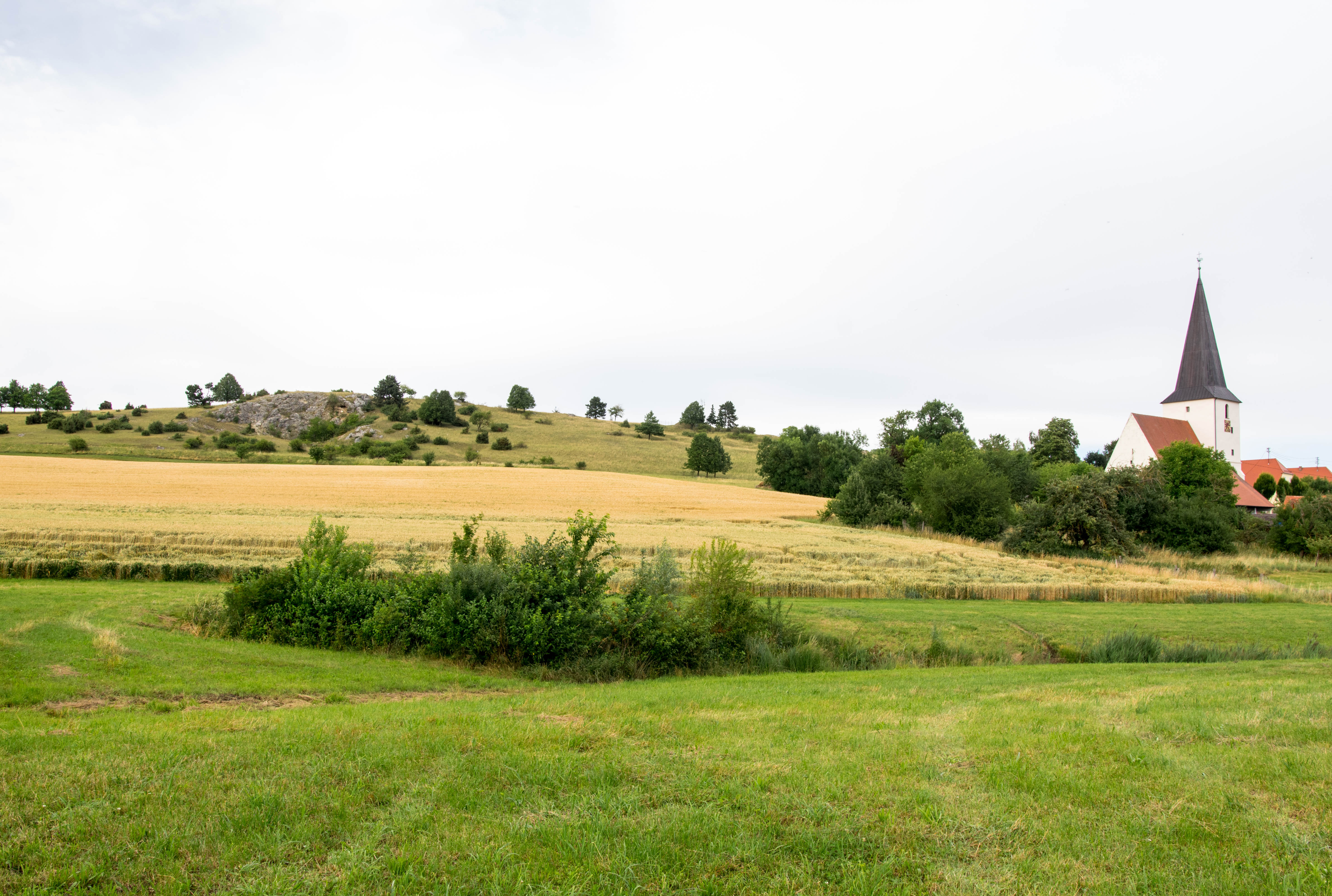 Blick von Süden gegen den Hang westlich Schmähingen, rechts die Schmähinger Kirche. Landschaftsschutzgebiet Schmähingen Nord, LSG-00353.01